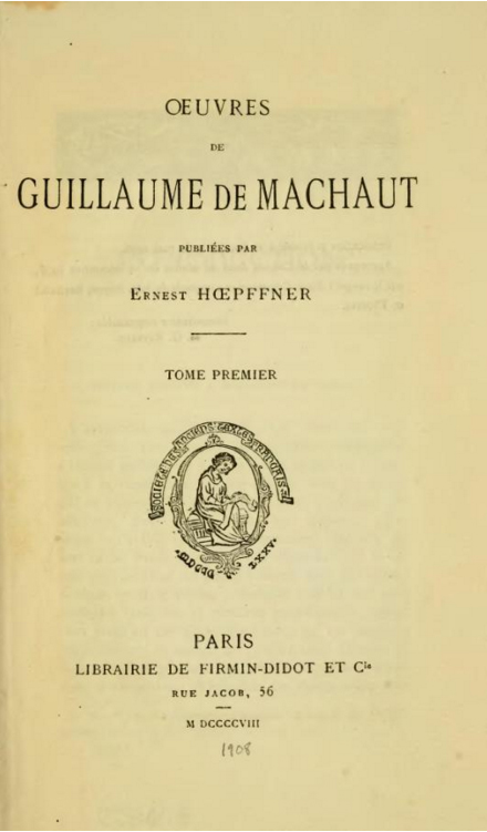 Oeuvres de Guillaume de Machaut - capa tomo